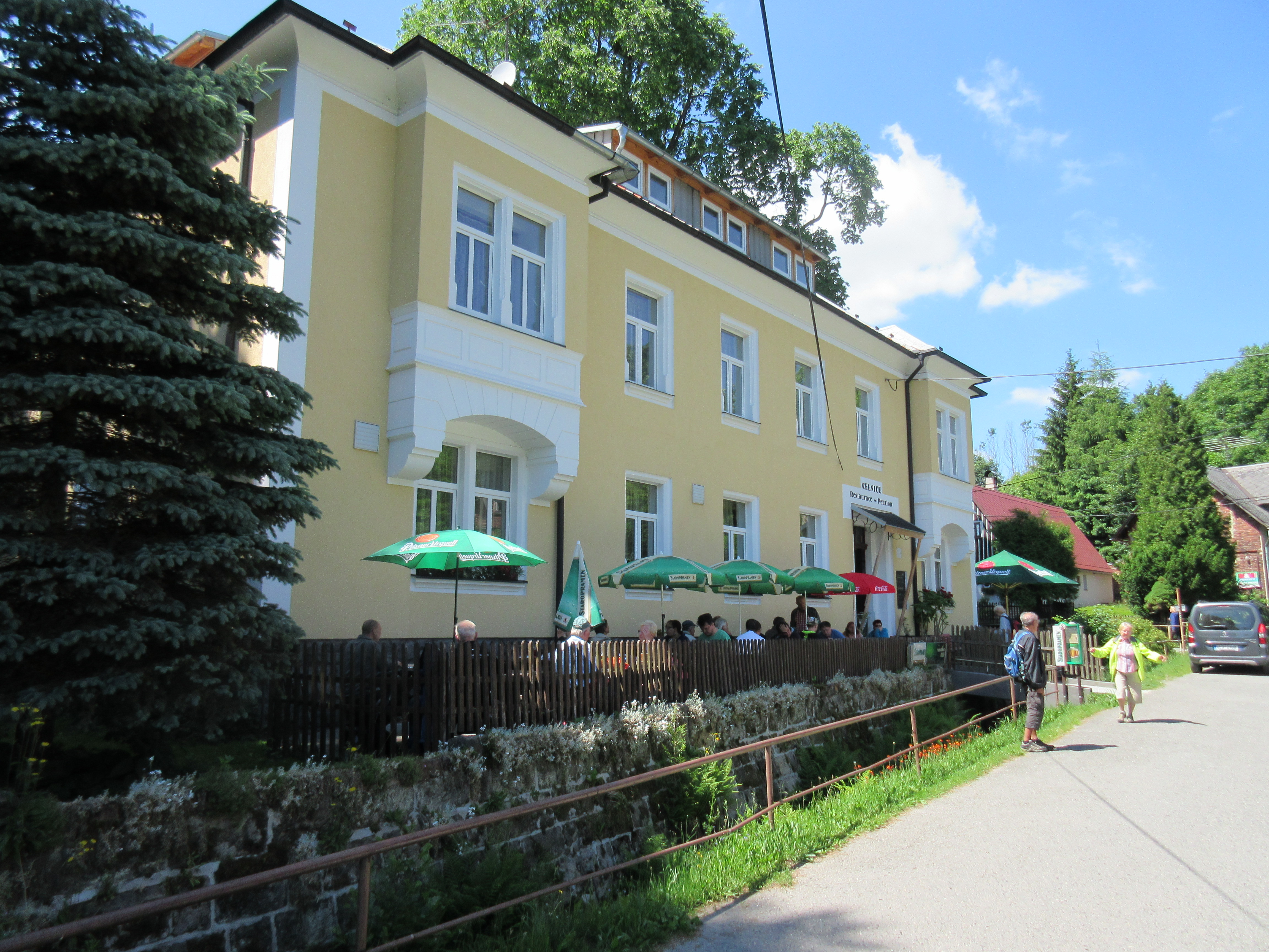 Restaurace v Dolní Světlé